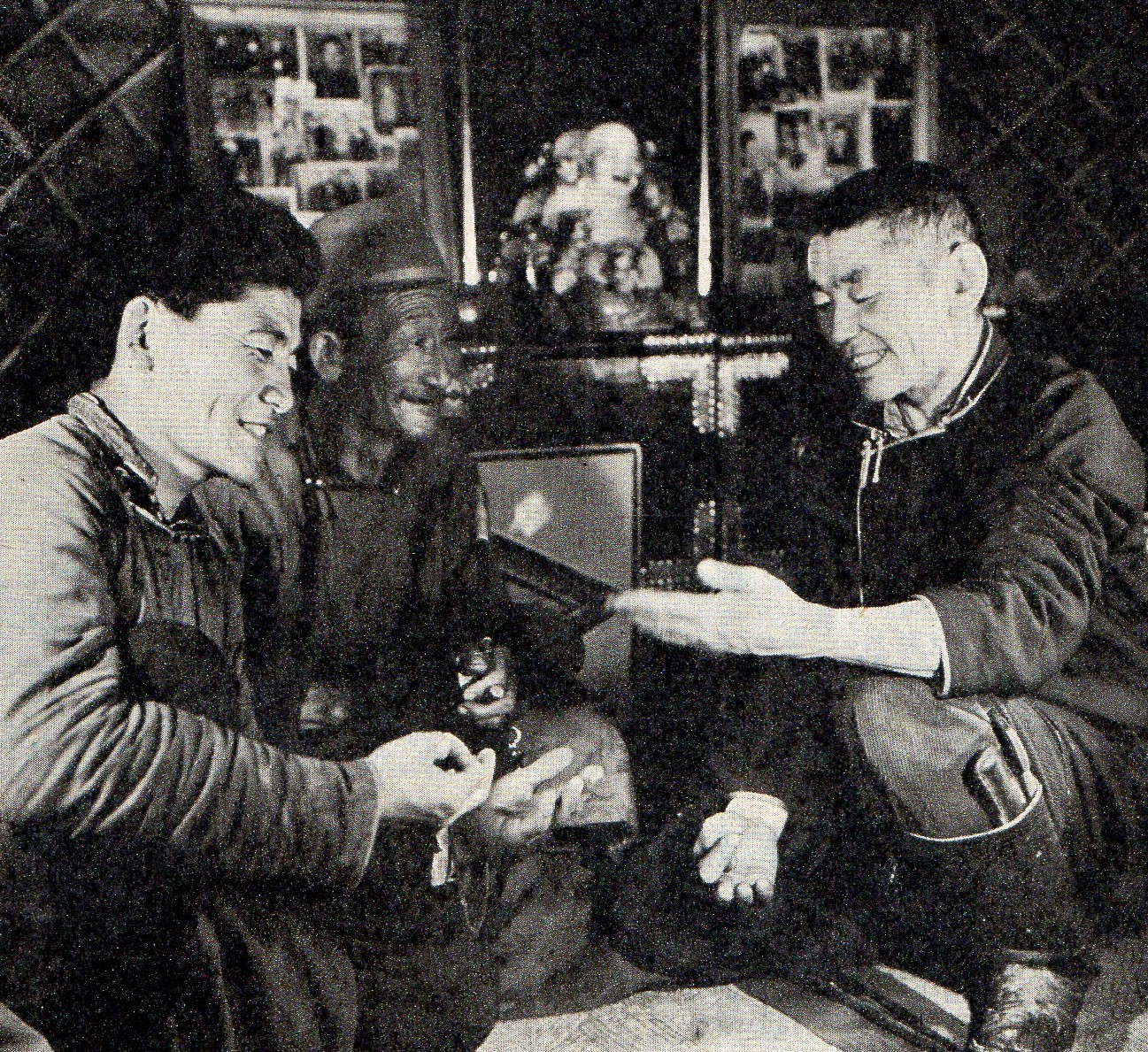 Mongolscy pasterze grający w kości.